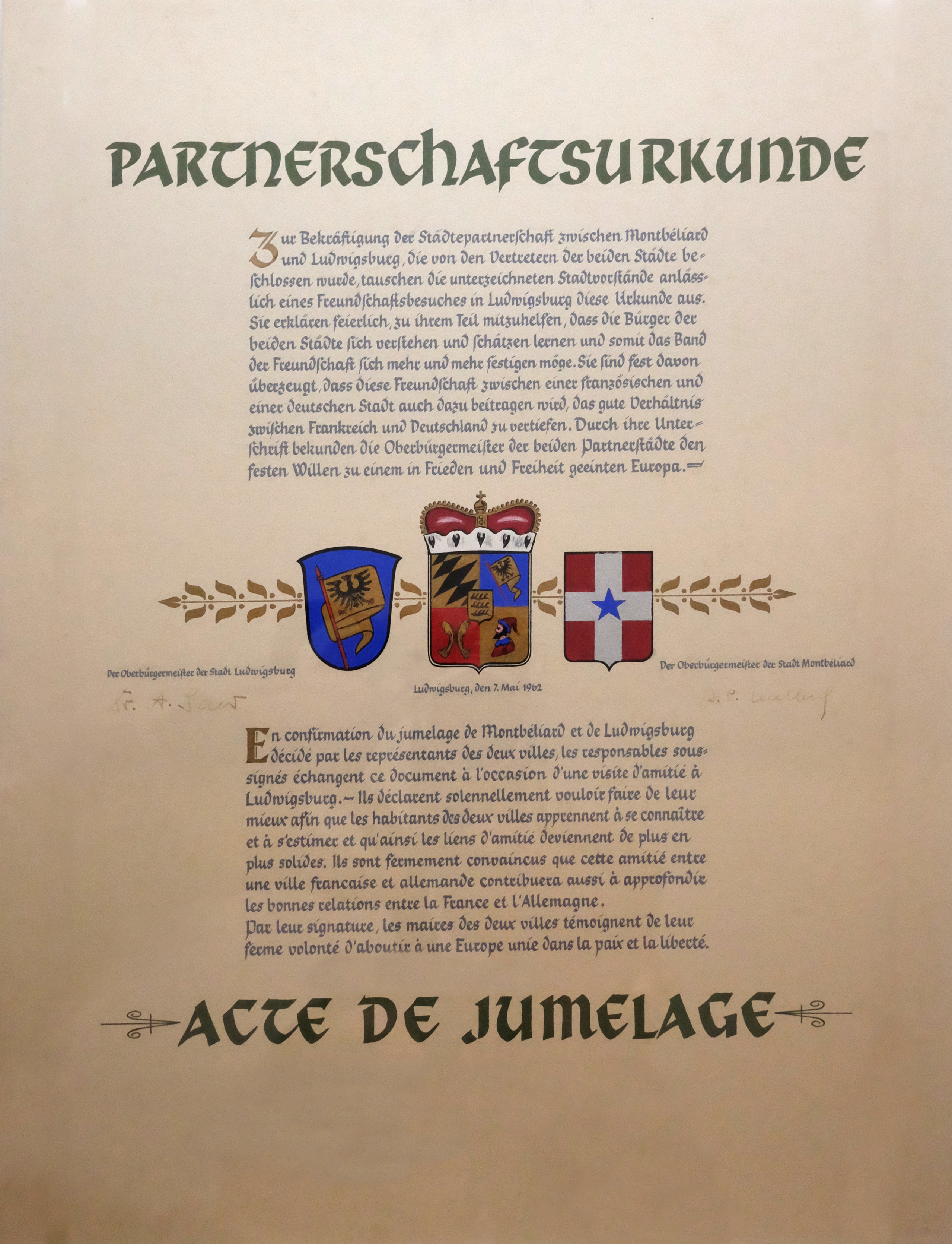 Das Ludwigsburg Museum in der Residenzstadt.